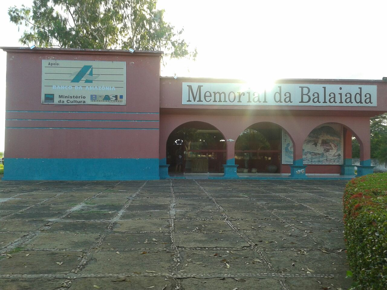 Vista externado Memorial da Balaiada, em Caxias, no Maranhão. Tendo a identificação de apoiamento do Ministério da Cultura.